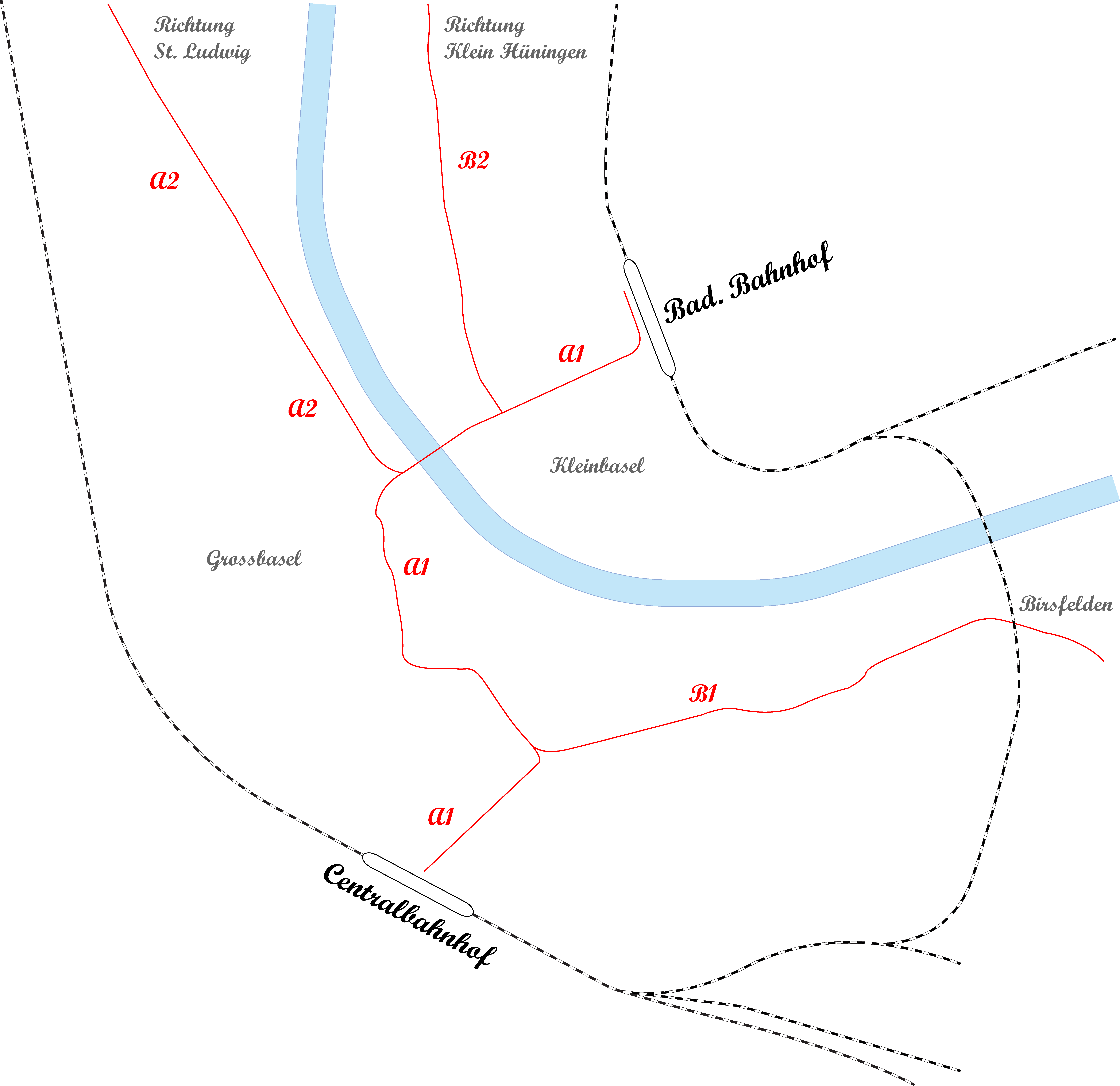 Plan des französischen Büros Féral & von Pirch für ein Pferde-Tramwaynetz aus dem Jahre 1880. Eigene Nachzeichnung des Originalplans.